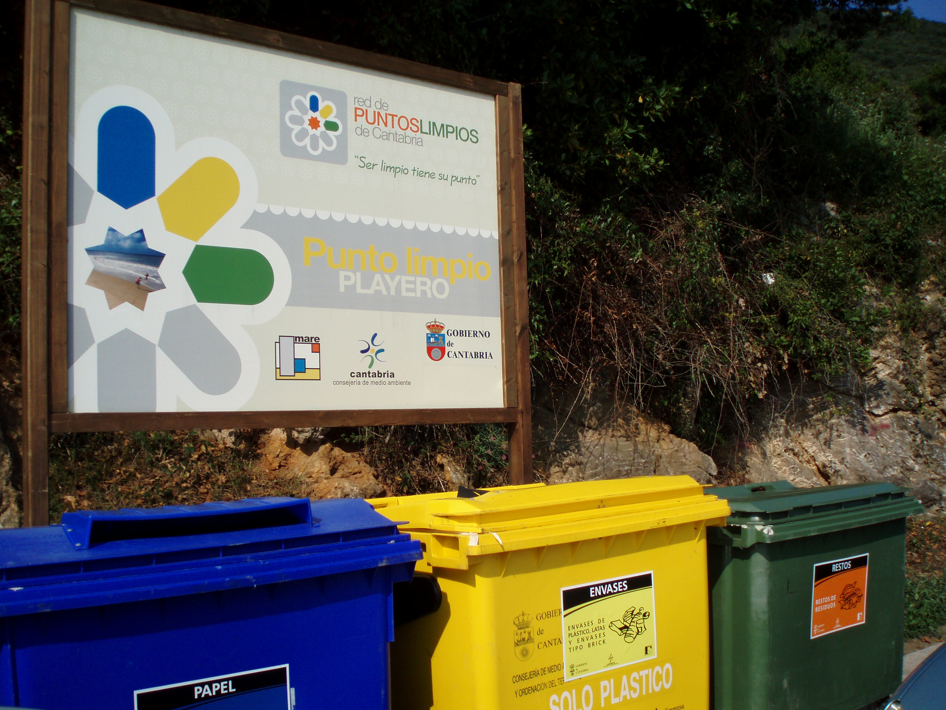 Porque "ser limpio tiene su punto". OMG!